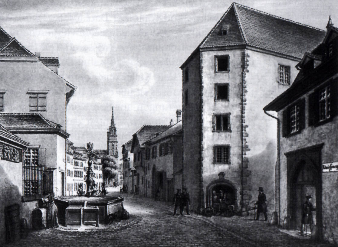 Basel: Blick vom Rheinsprung durch die Augustinergasse zum Münsterplatz. Im Hintergrund das Basler Münster, rechts das Augustinerkloster, der polygonale Chor der Klosterkirche ragt in die Strasse hinein. Aquarell von Johann Jakob Neustück (1799–1867), 1843.